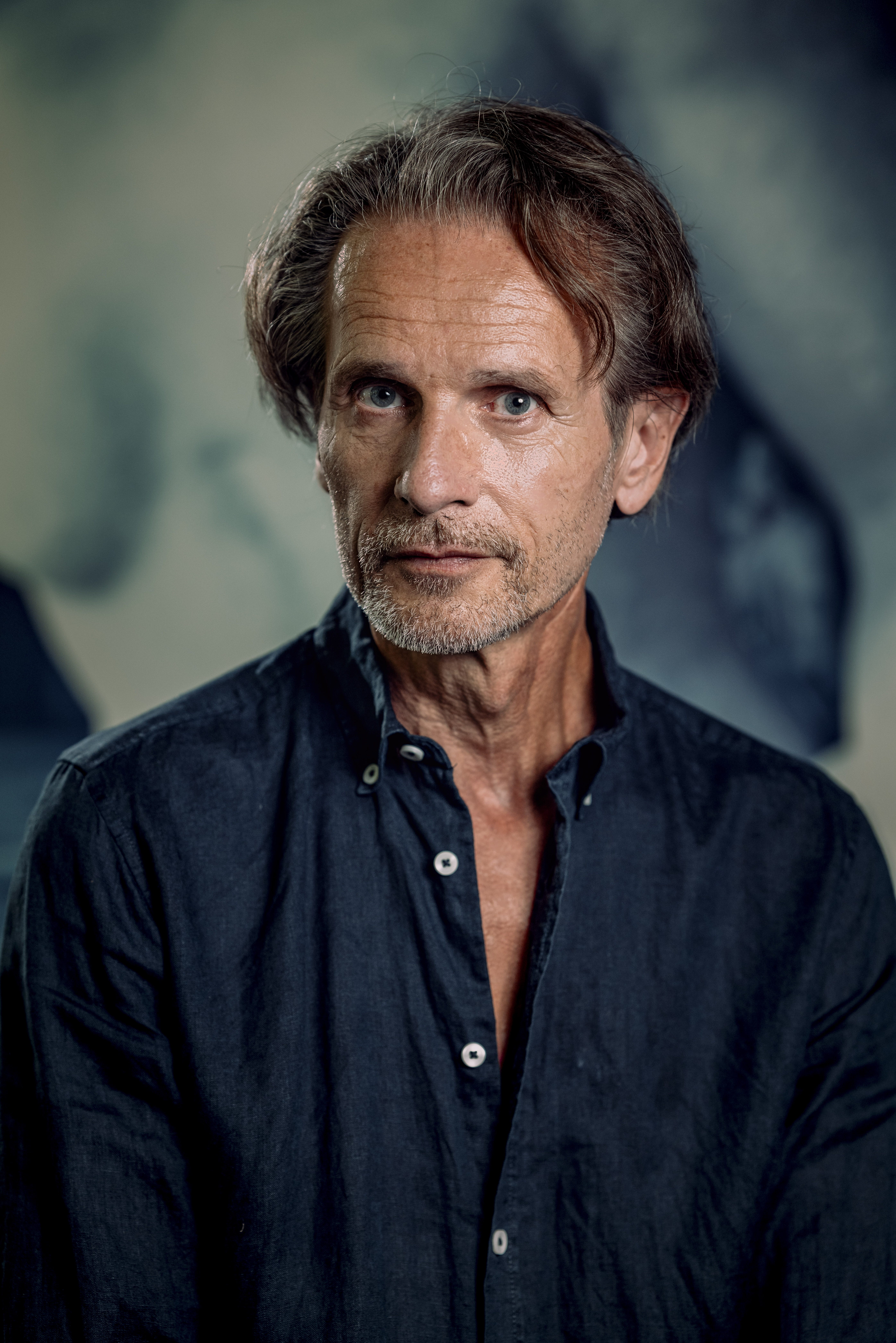 This image depicts Alexander Höchst. Ich habe all rights and this image.